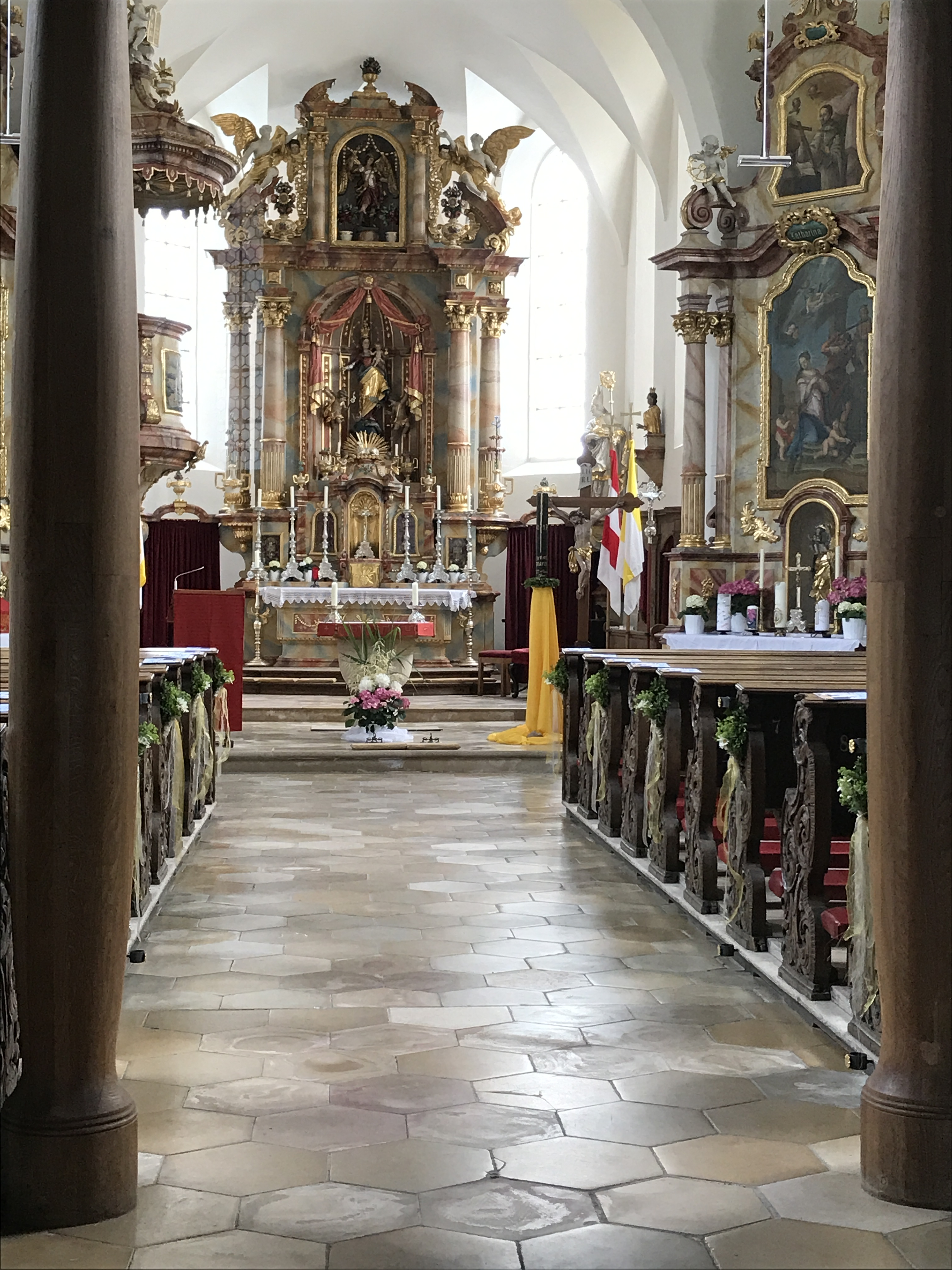 Innenraum der Pfarrkirche Mariae Geburt in Geisling, gotisch, barock und klassizistisch umgestaltet; Hochaltar barock, klassizistisch umgestaltet; Seitenaltäre und Kanzel klassizistisch